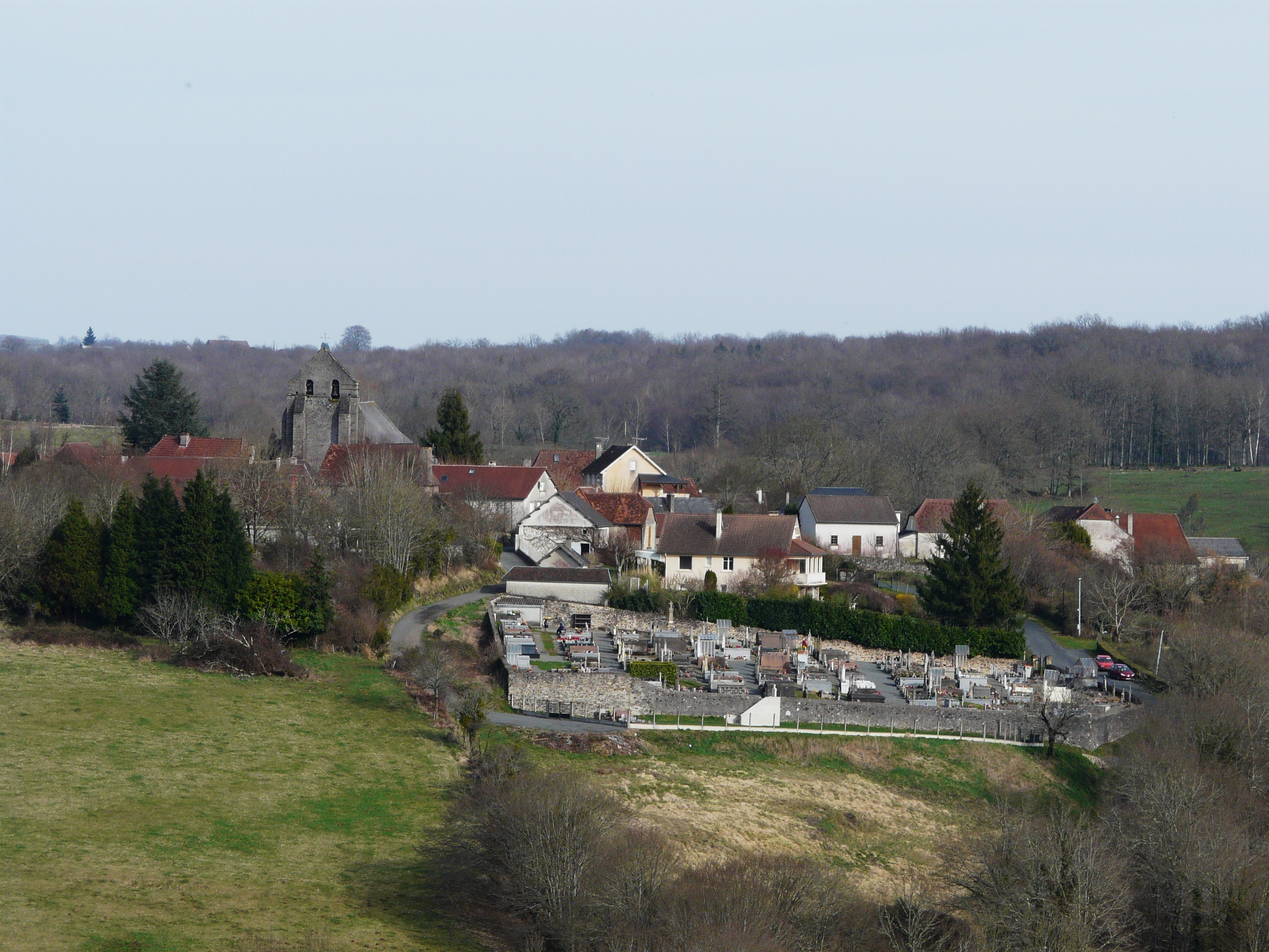 Le bourg de Saint-Mesmin vu depuis le village de Charoncle, Dordogne, France